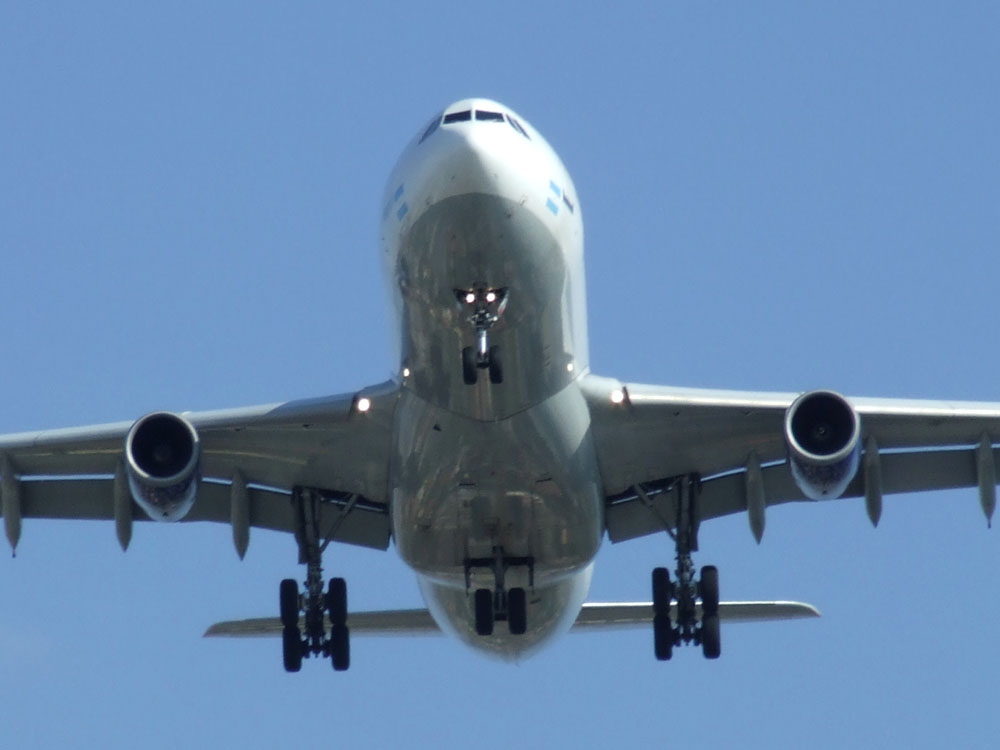 Aereo in avvicinamento, carrello fuori